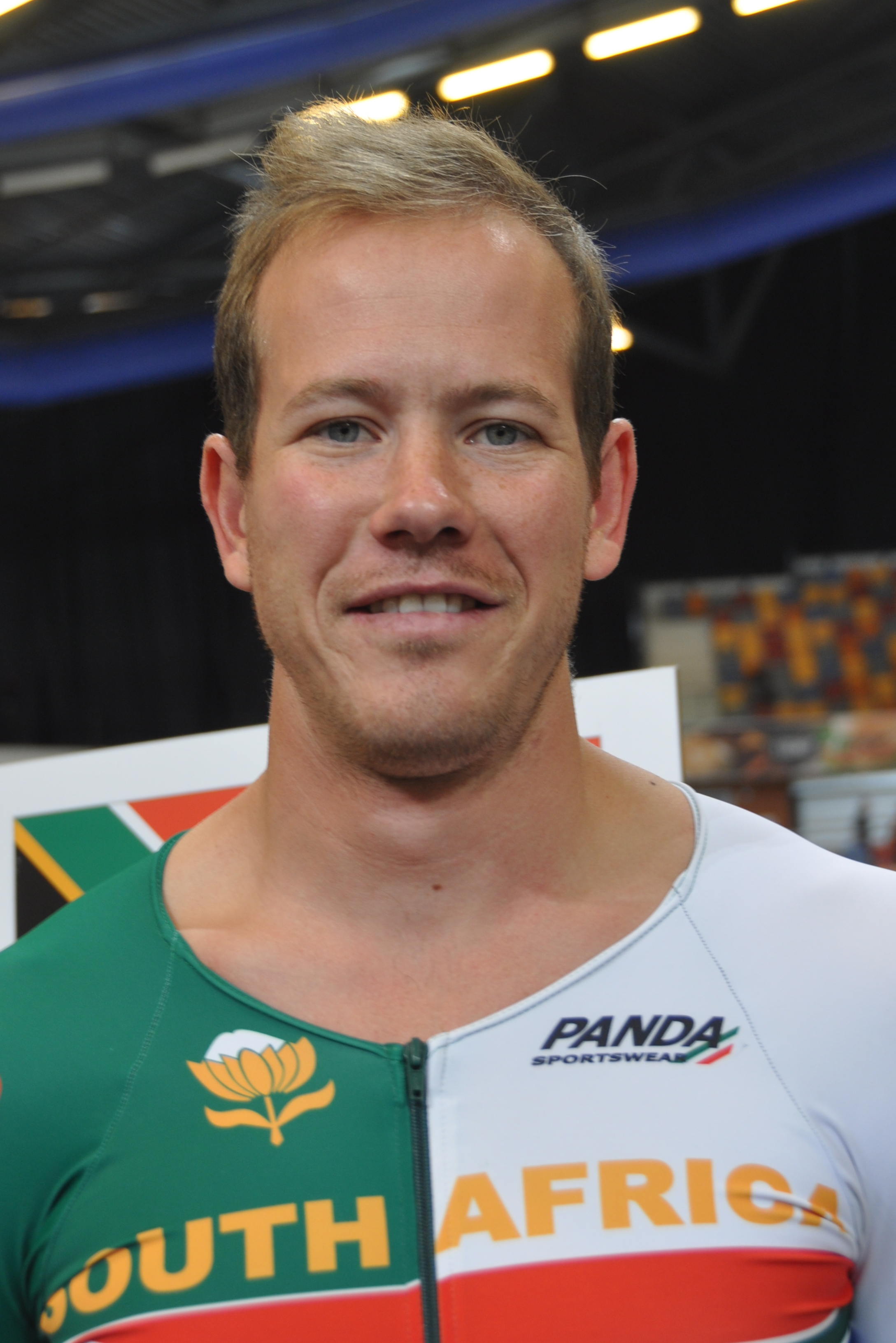 Jean Spies, Radsportler aus Südafrika